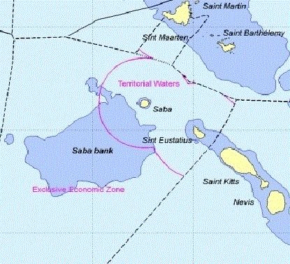 Locatie Sababank